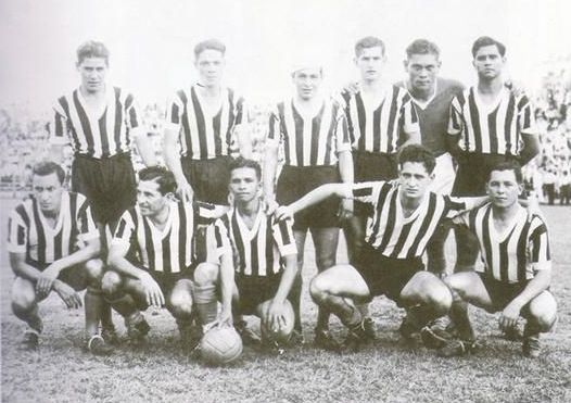 Equipo Libertad Campeón 1945